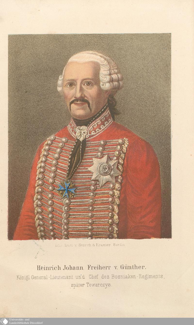 Johann Heinrich von Günther (* 1736 in Neu-Ruppin; † 22. April 1803) war ein deutscher Husarenoffizier in der altpreußischen Armee. Er war zuletzt Generalleutnant und galt als Meister des Kleinen Krieges.